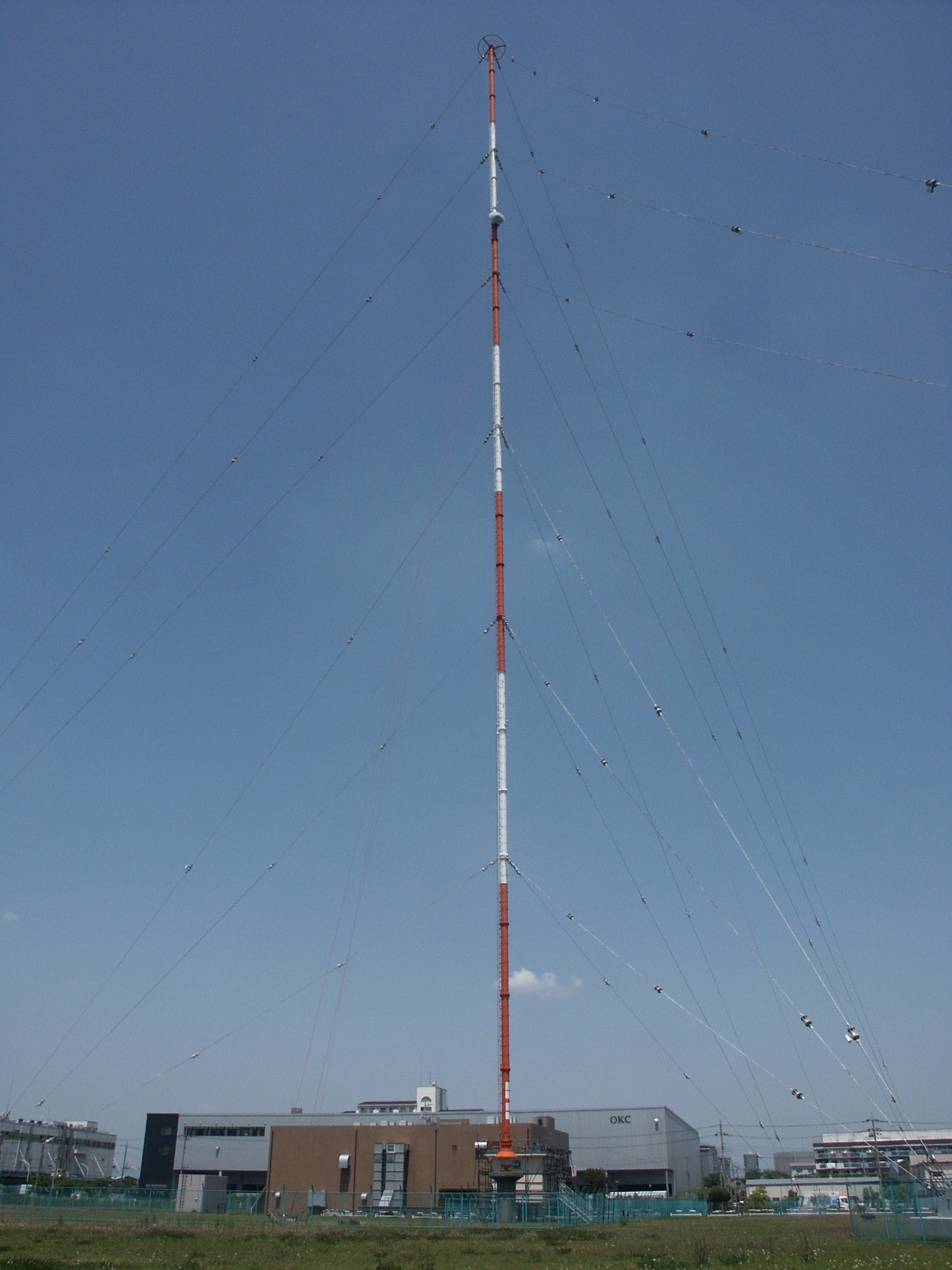 TBS戸田送信所送信アンテナ（送信所南側道路から撮影）